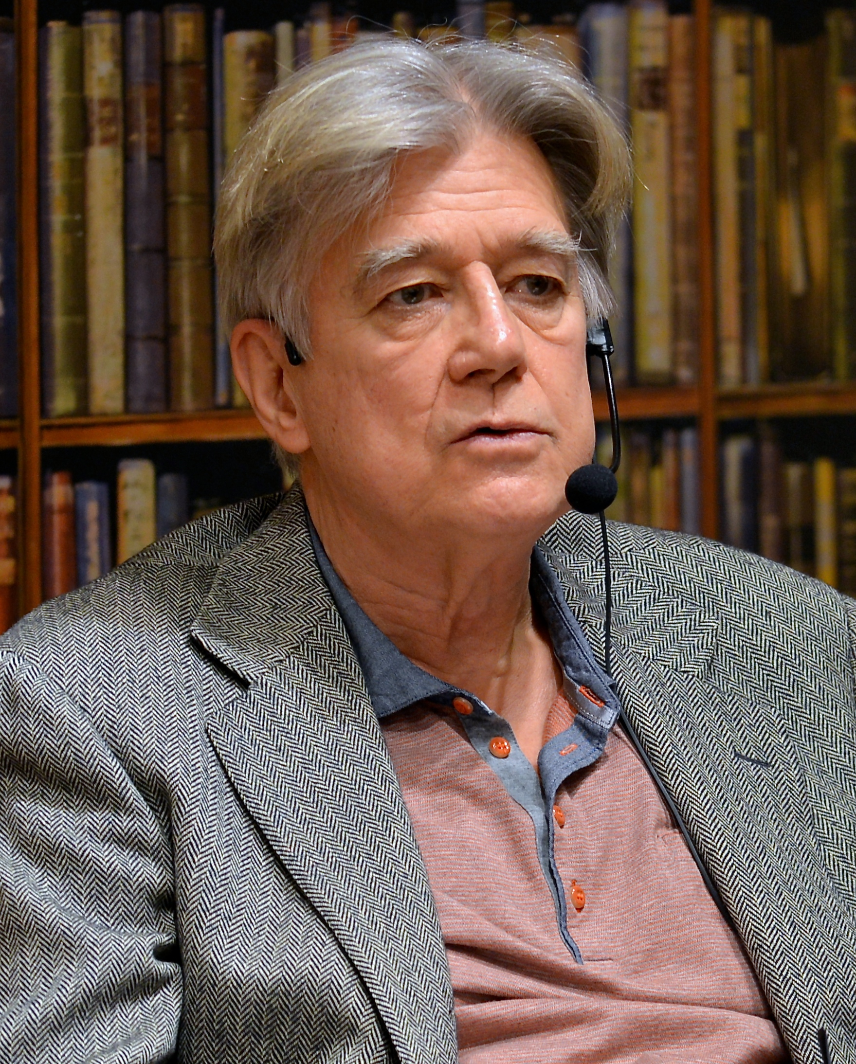 Elin Klinga, Magnus Florin och Hans Klinga från Dramaten samtalar om pjäsen Mästaren och Margarita på Akademibokhandeln på Mäster Samuelsgatan i Stockholm den 29 januari 2014.